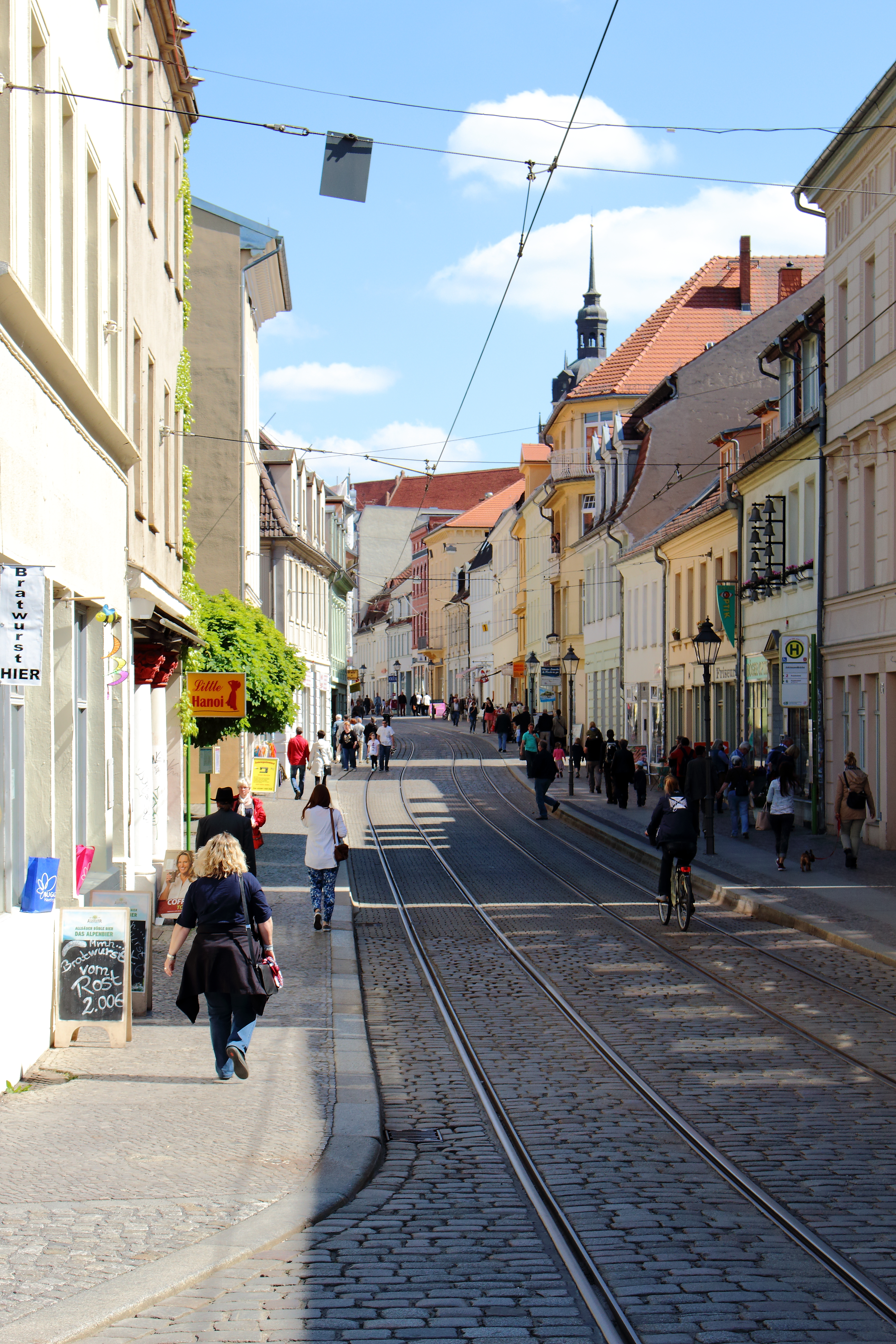 Hauptstraße in Brandenburg an der Havel